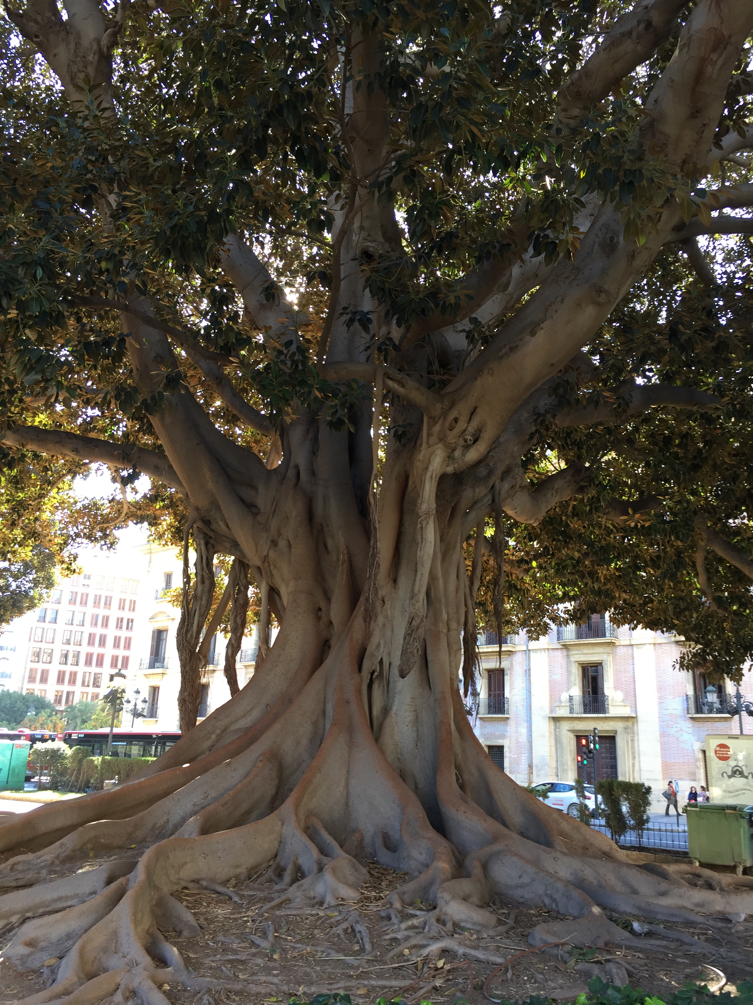 Arbre monumental situé dans la Plaza de Tetuán. Valencia (Espagne)